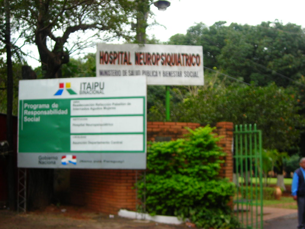 neurosi